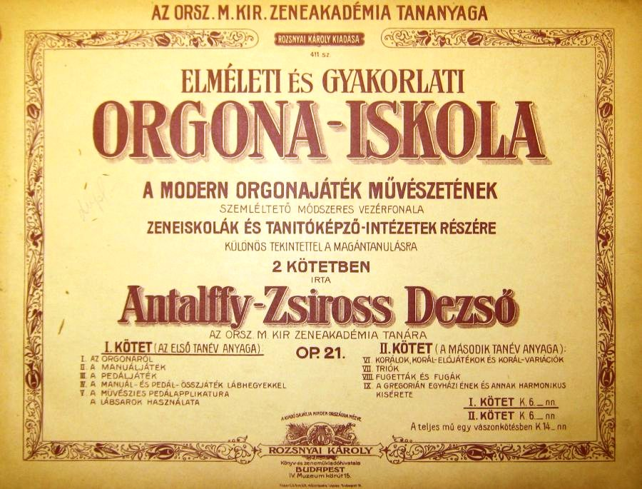 Antalffy-Zsiross Dezső: Elméleti és gyakorlati orgona-iskola. Az Országos Magyar Királyi Zeneakadémia tananyaga